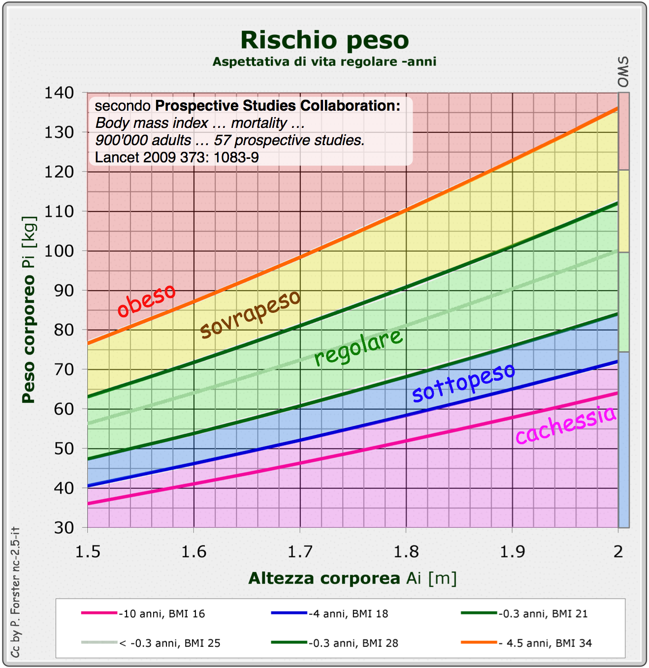 Rischio peso: biometria, epidemiologia, valutazione, rischio, peso corporeo umano, mortalità, indice di massa corporea, IMC, body mass index, BMI, prospective studies collaboration